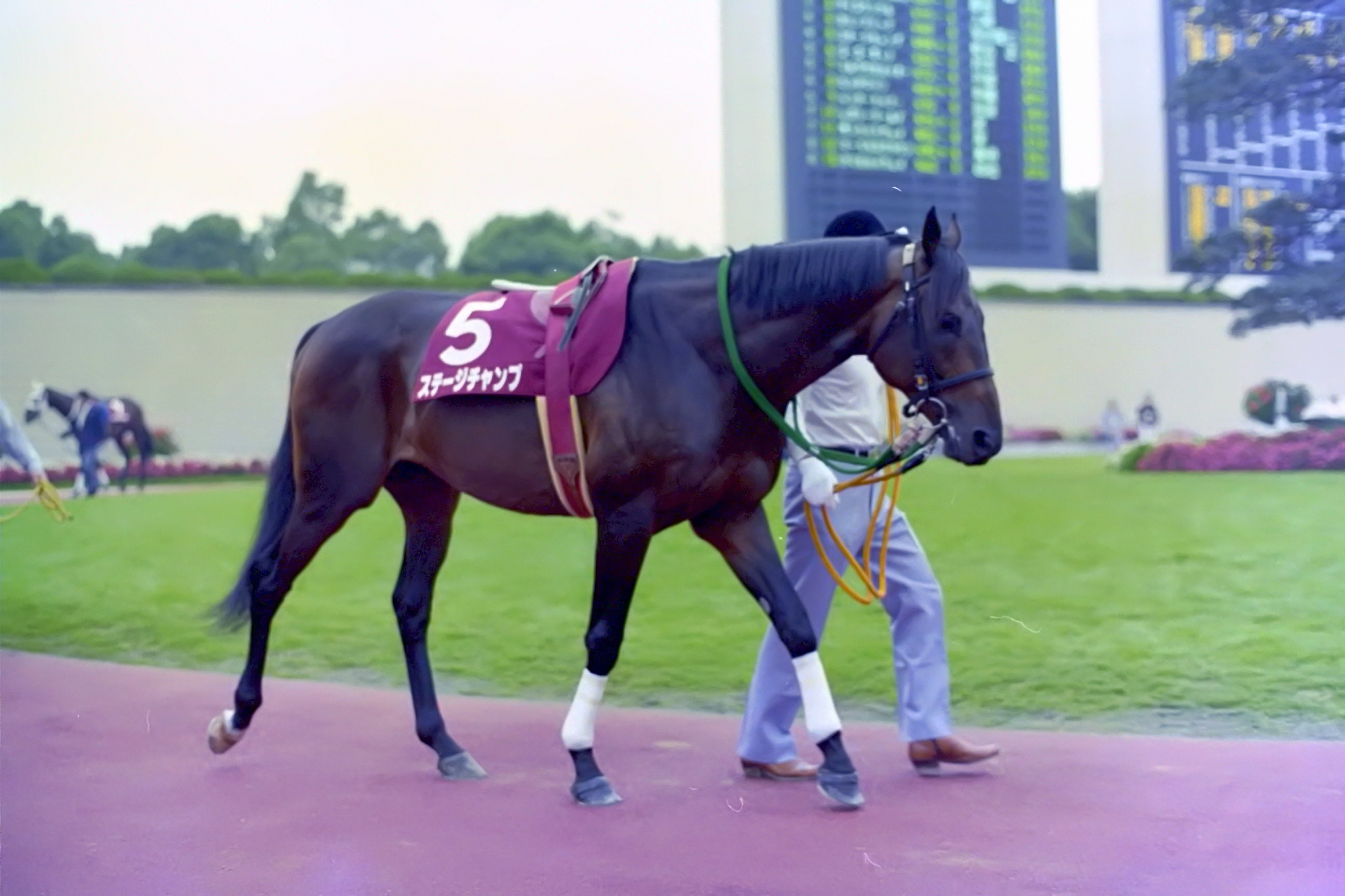 ステージチャンプ 1995年10月8日 京都競馬場